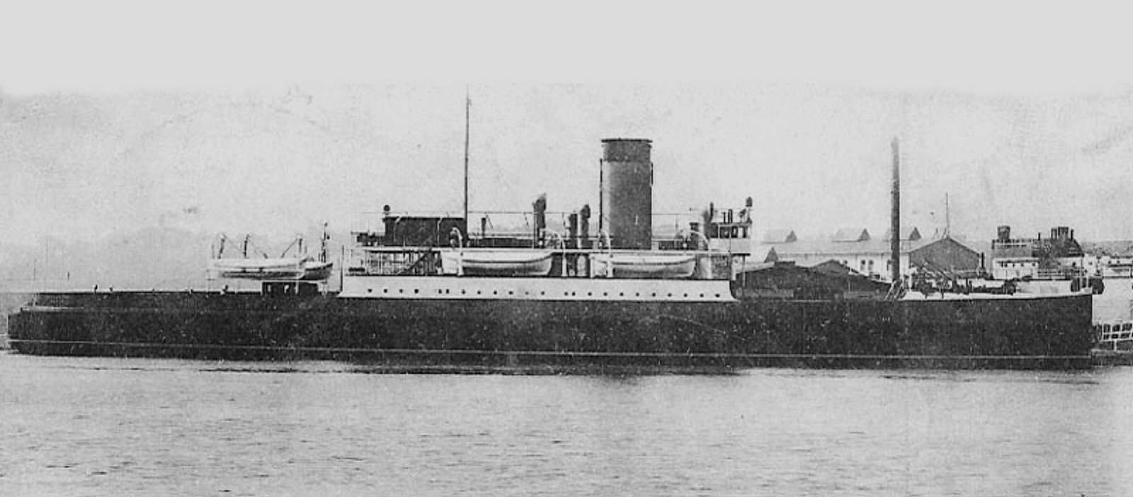 Eisenbahnfährschiff Mecklenburg, Baujahr 1903, Reederei der Großherzoglich Mecklenburgische Friedrich-Franz-Eisenbahn (M.F.F.E), Fährlinie Gedser-Warnemünde, verschrottet 1958.